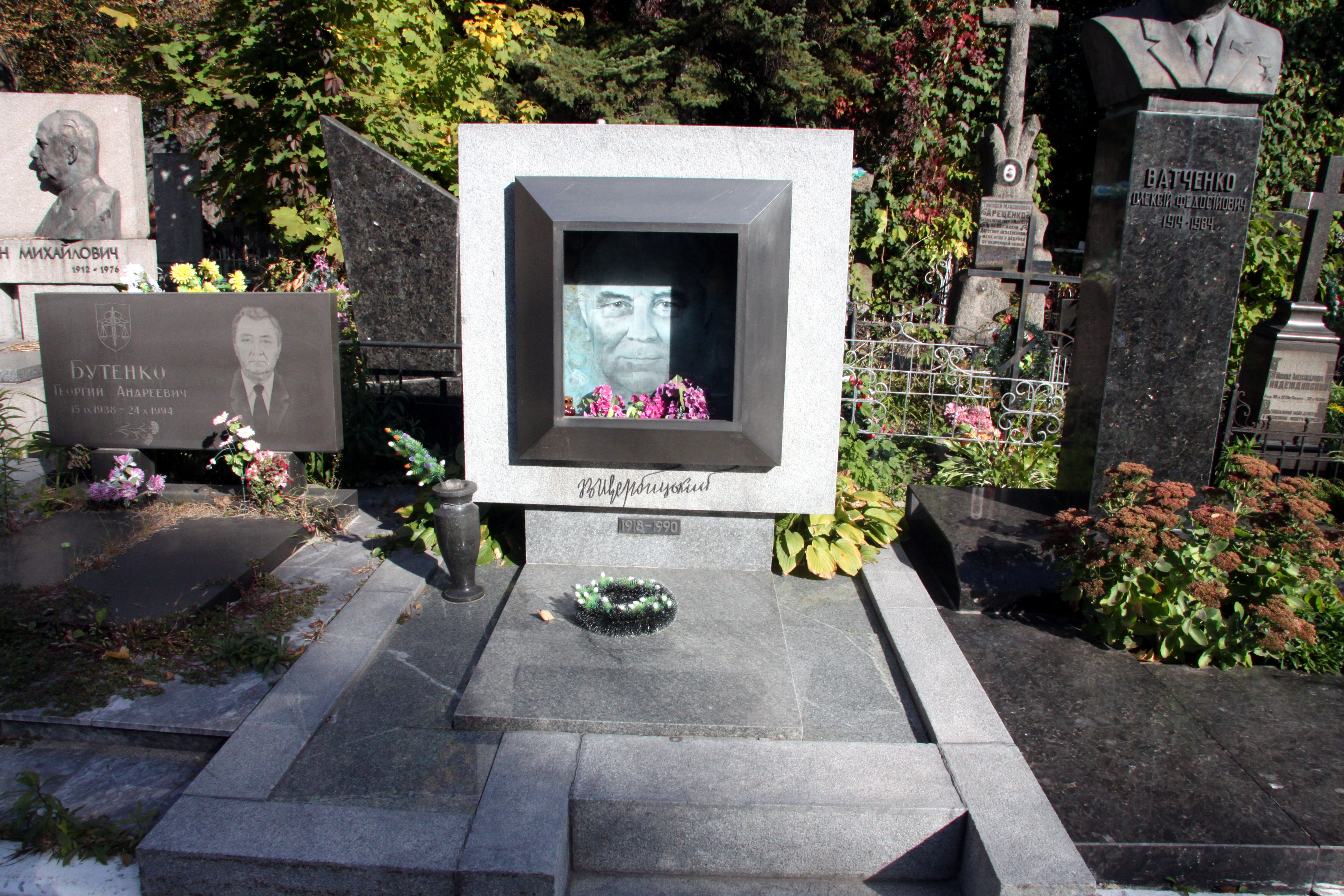 Могила Щербицького В. В., радянського партійного і державного діяча, Байкова вул., 6, Київ